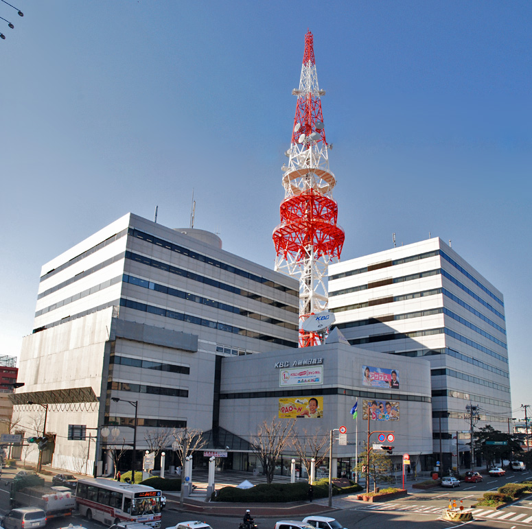 2007年12月26日、投稿者自身が撮影した九州朝日放送本社ビル。